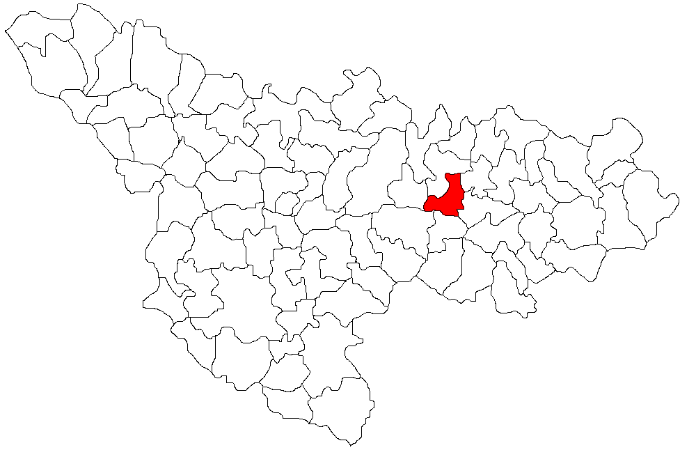 Belint, Timis Licensing Categorie:Hărţi ale judeţului Timiş